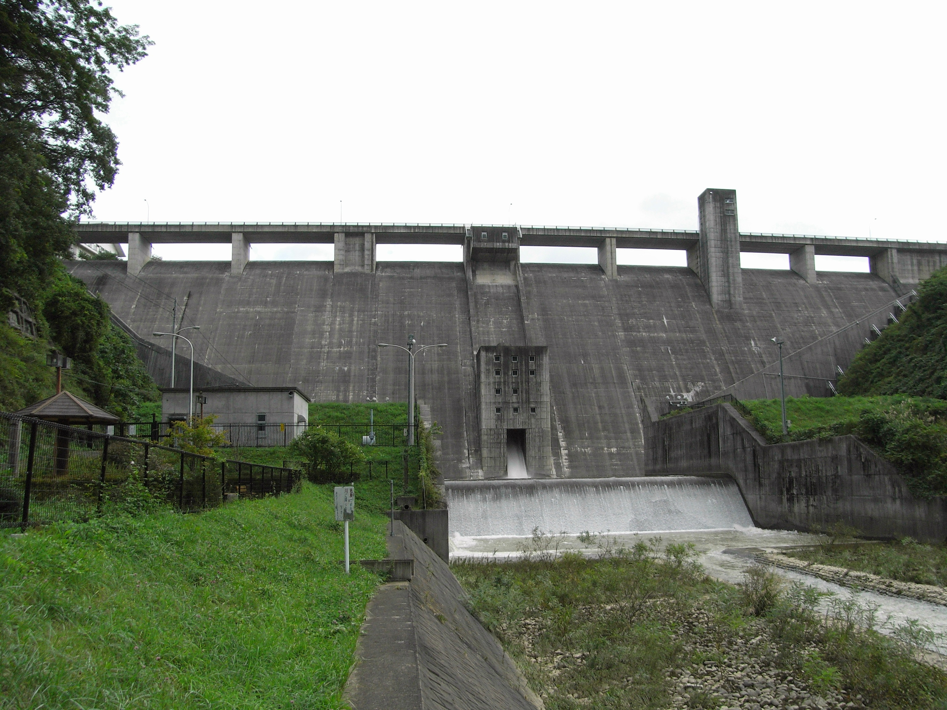 綱取ダム（中津川・岩手県。岩手県営）